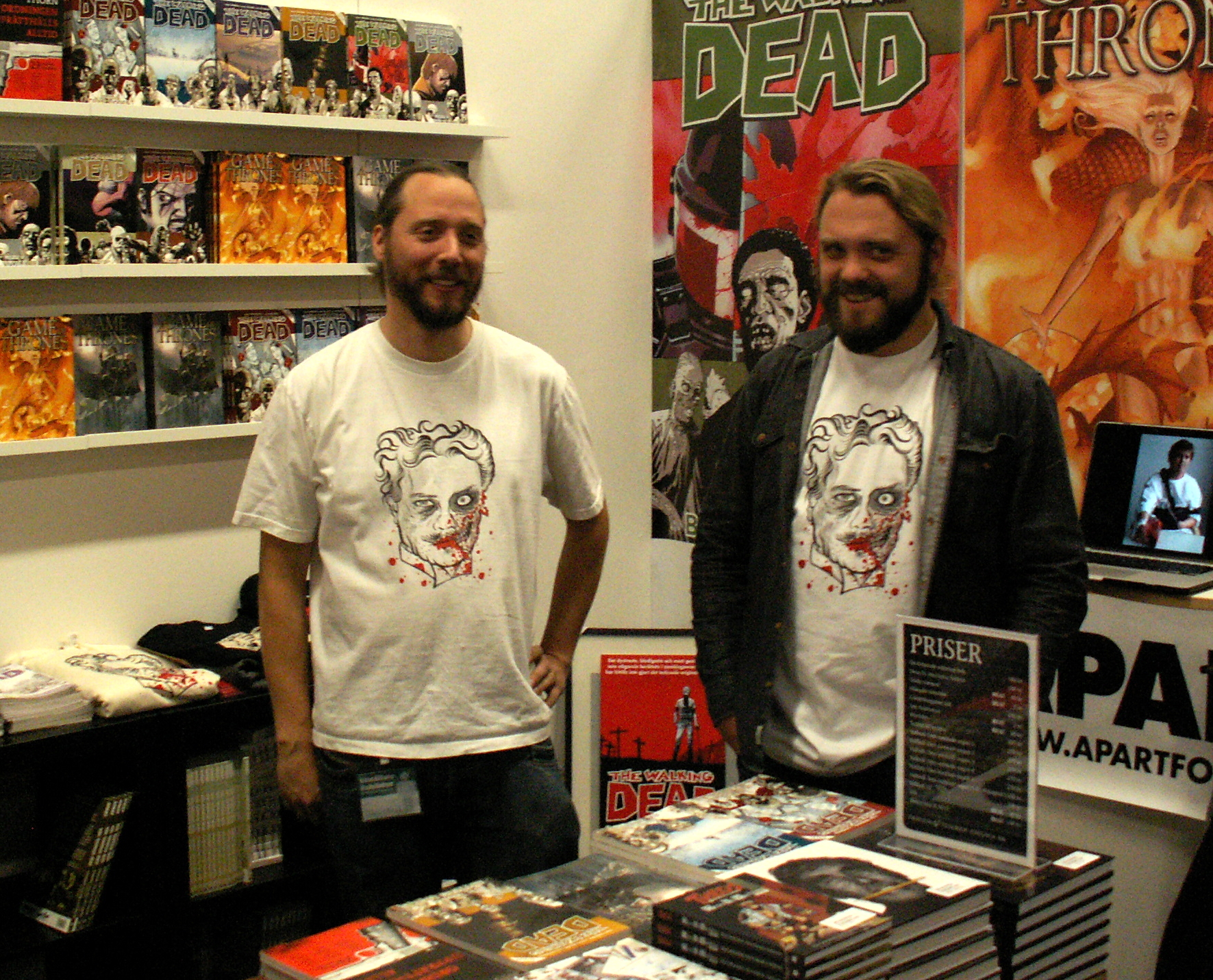 Johan Kimrin och Jimmy Wallin i montern för deras Apart förlag, på Bokmässan 2013 i Göteborg.